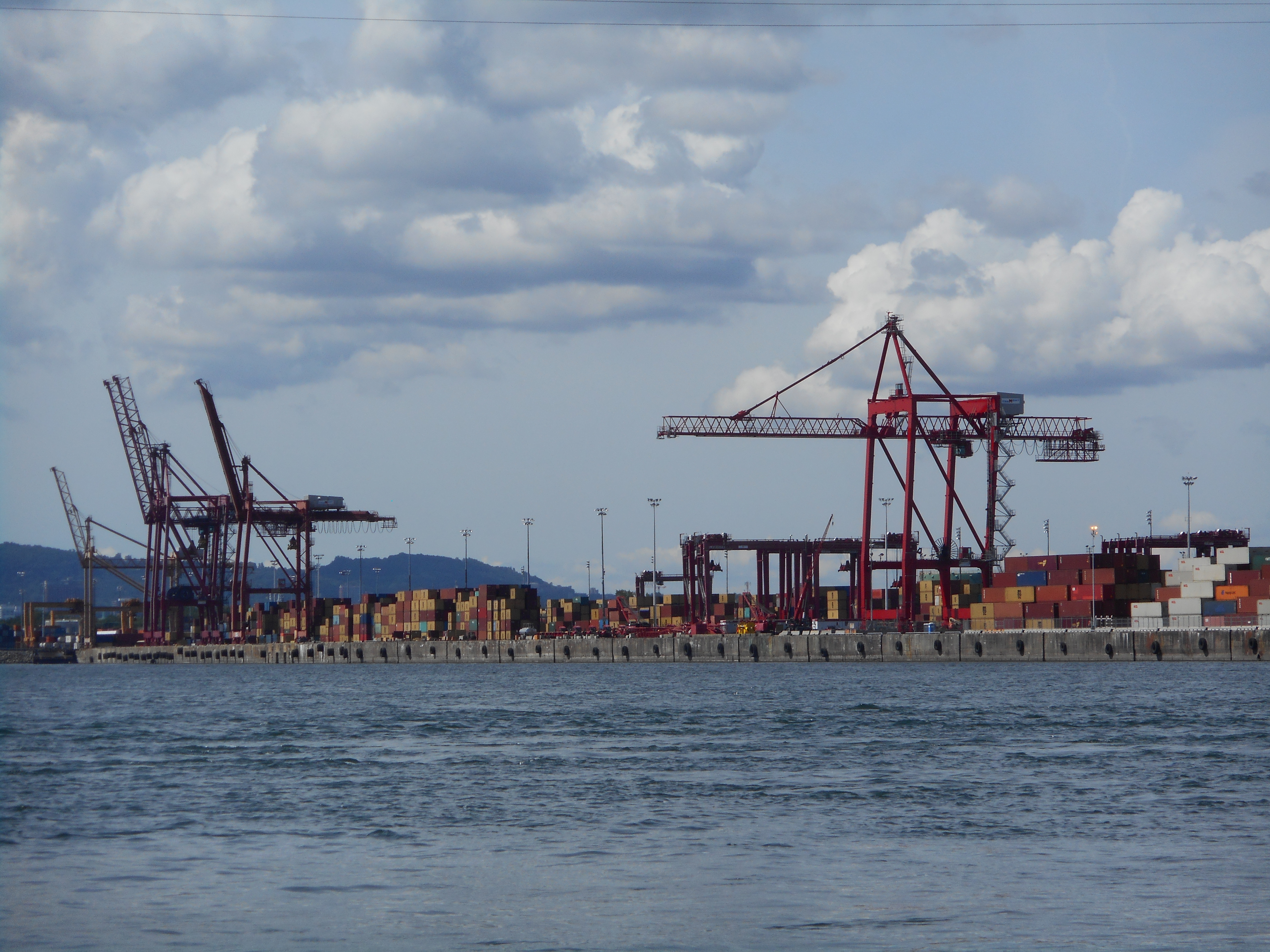 Vue du bateau: le port de Montréal Le service de navette fluviale entre Montréal (Promenade Bellerive) et l'île Charron est assuré par Navark. navark.ca